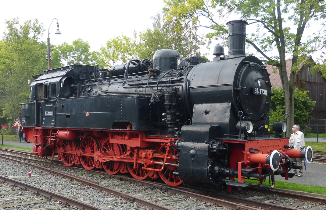 Dampflok 94 1730 in Neuenmarkt-Wirsberg im DDM